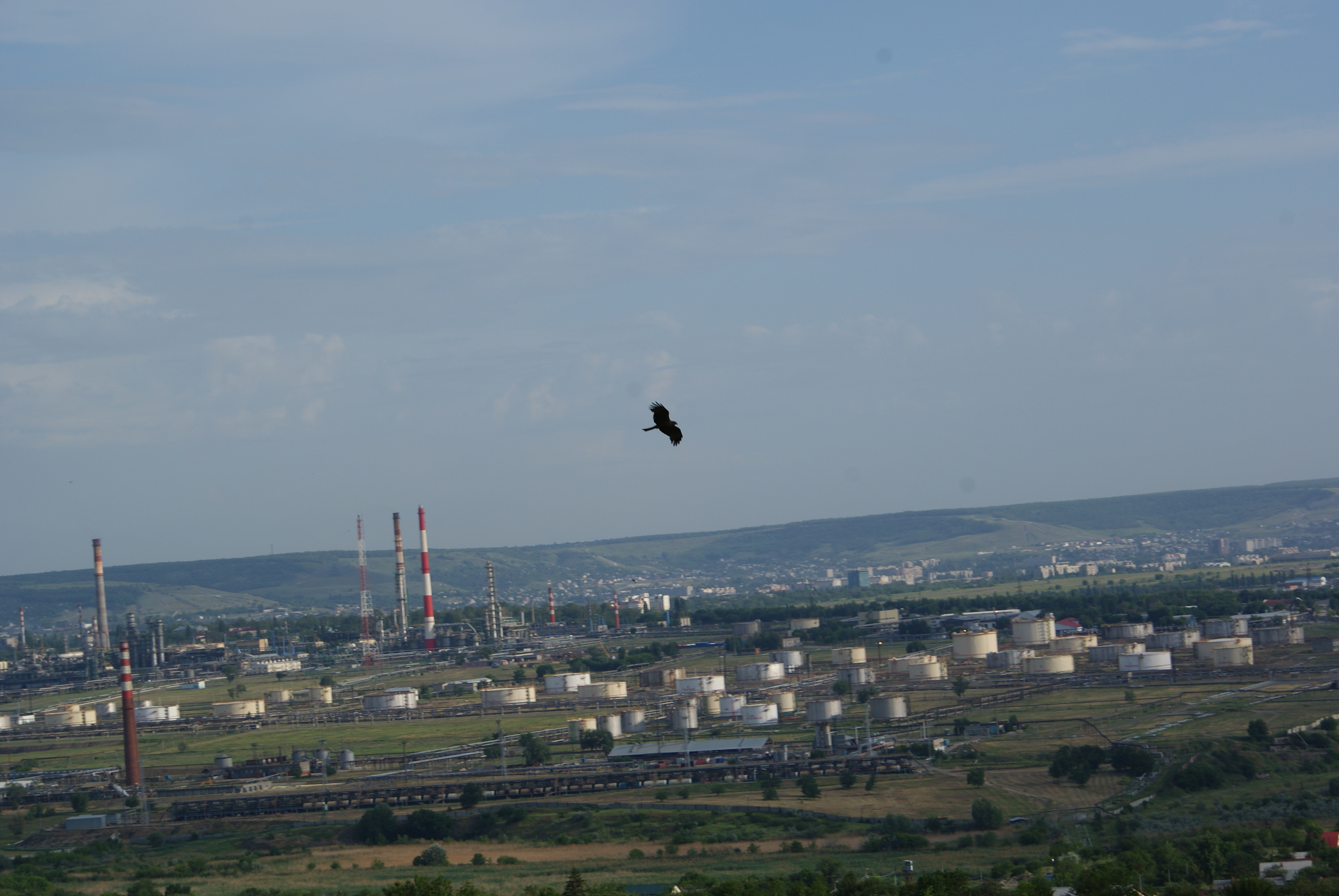 Орел над Крекингом